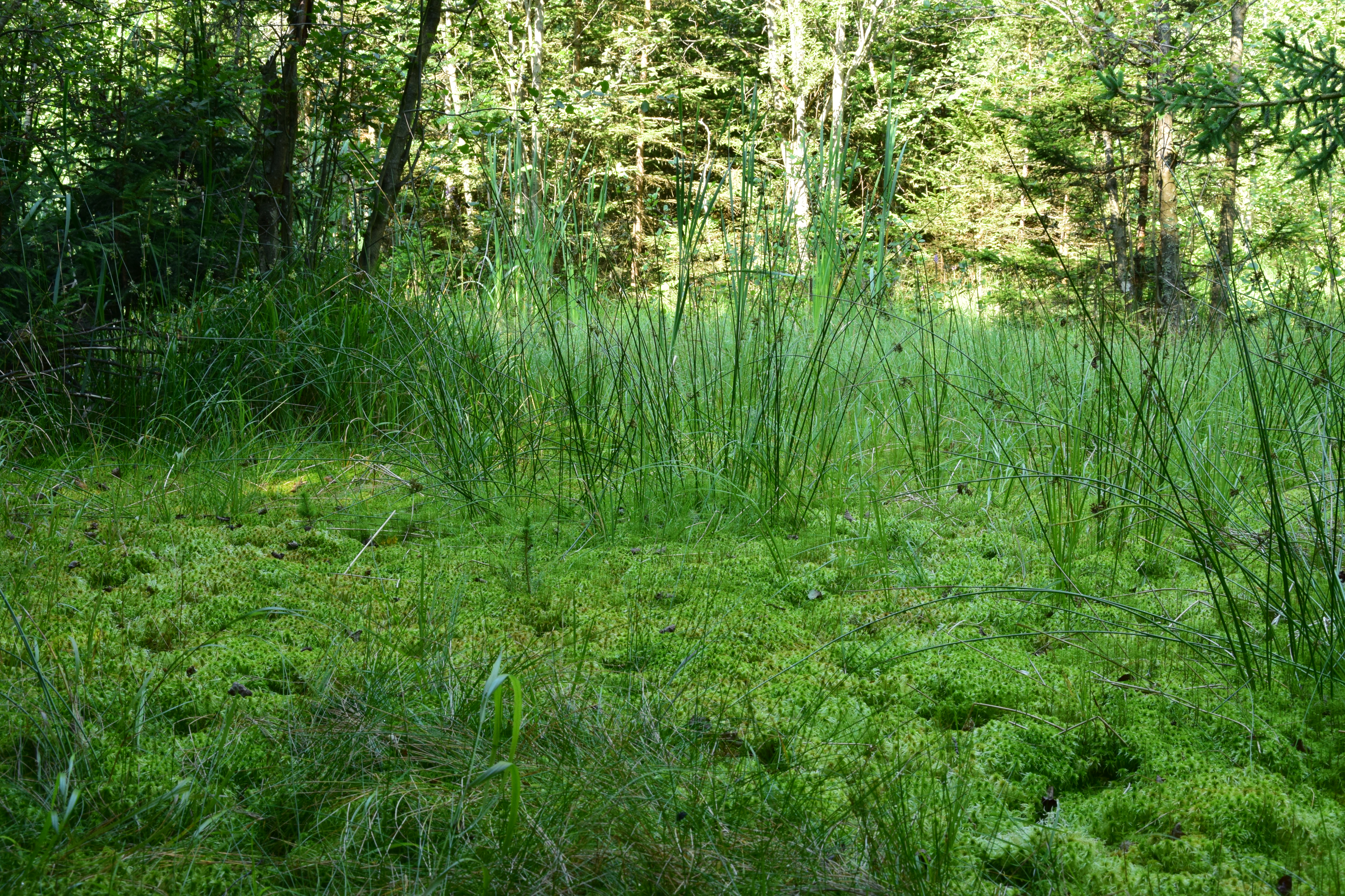 Zhůřský lom – rašeliniště na dně zaniklého lomu